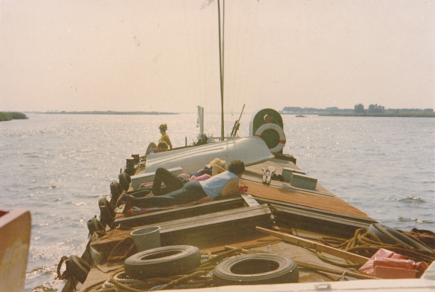 De Baukje van de Lischgroep, scouting groep 1 Rotterdam, met een reisje naar de Biesbosch.